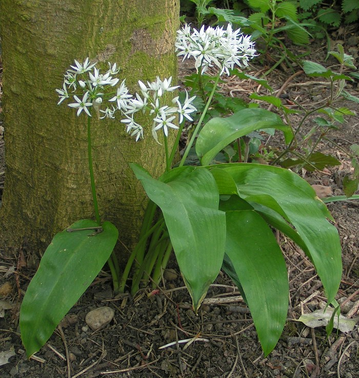 Allium ursinum L.